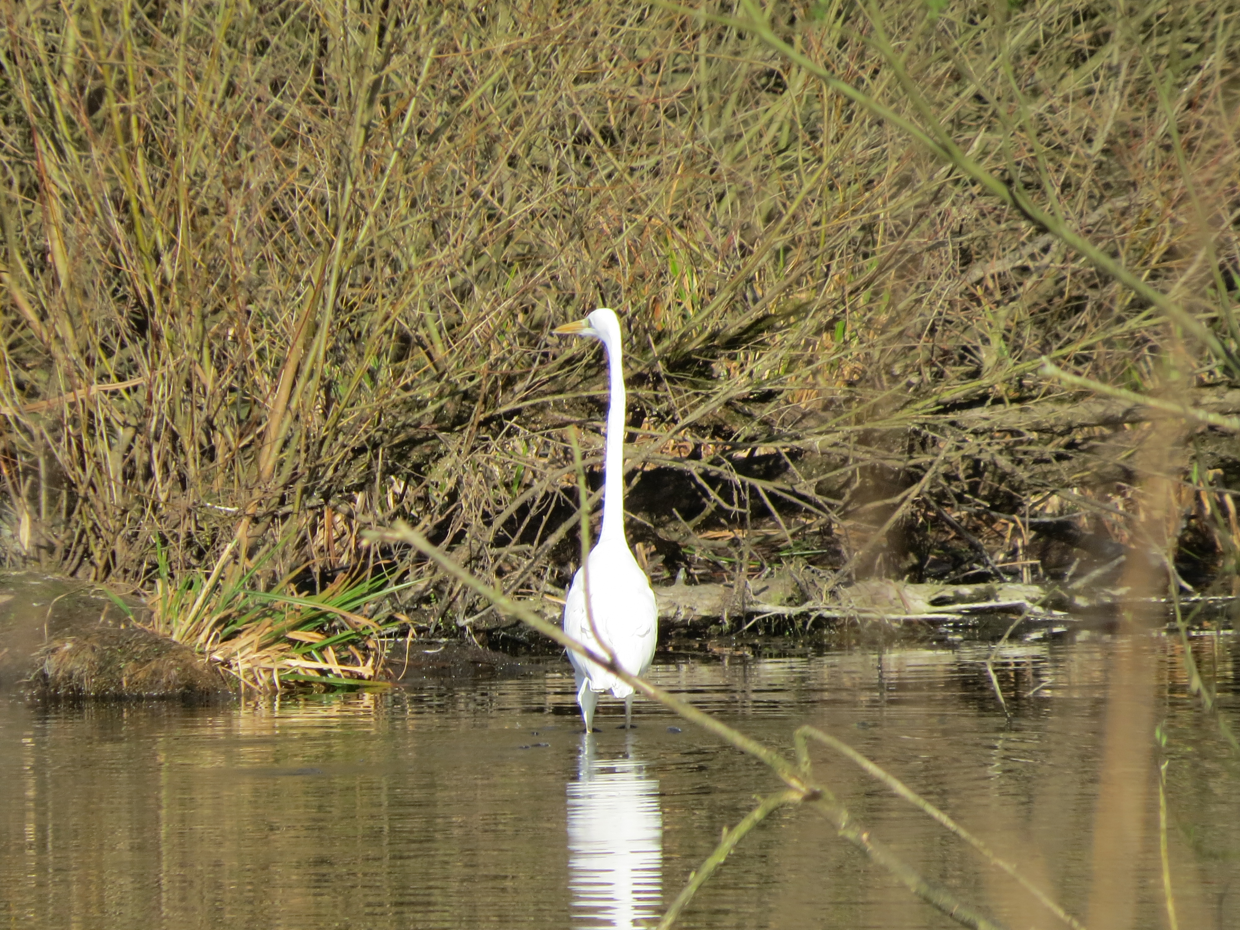 Silberreiher (Ardea alba) im Urdenbacher Altrhein (Teil des Naturschutzgebiets „Urdenbacher Kämpen“), Düsseldorf